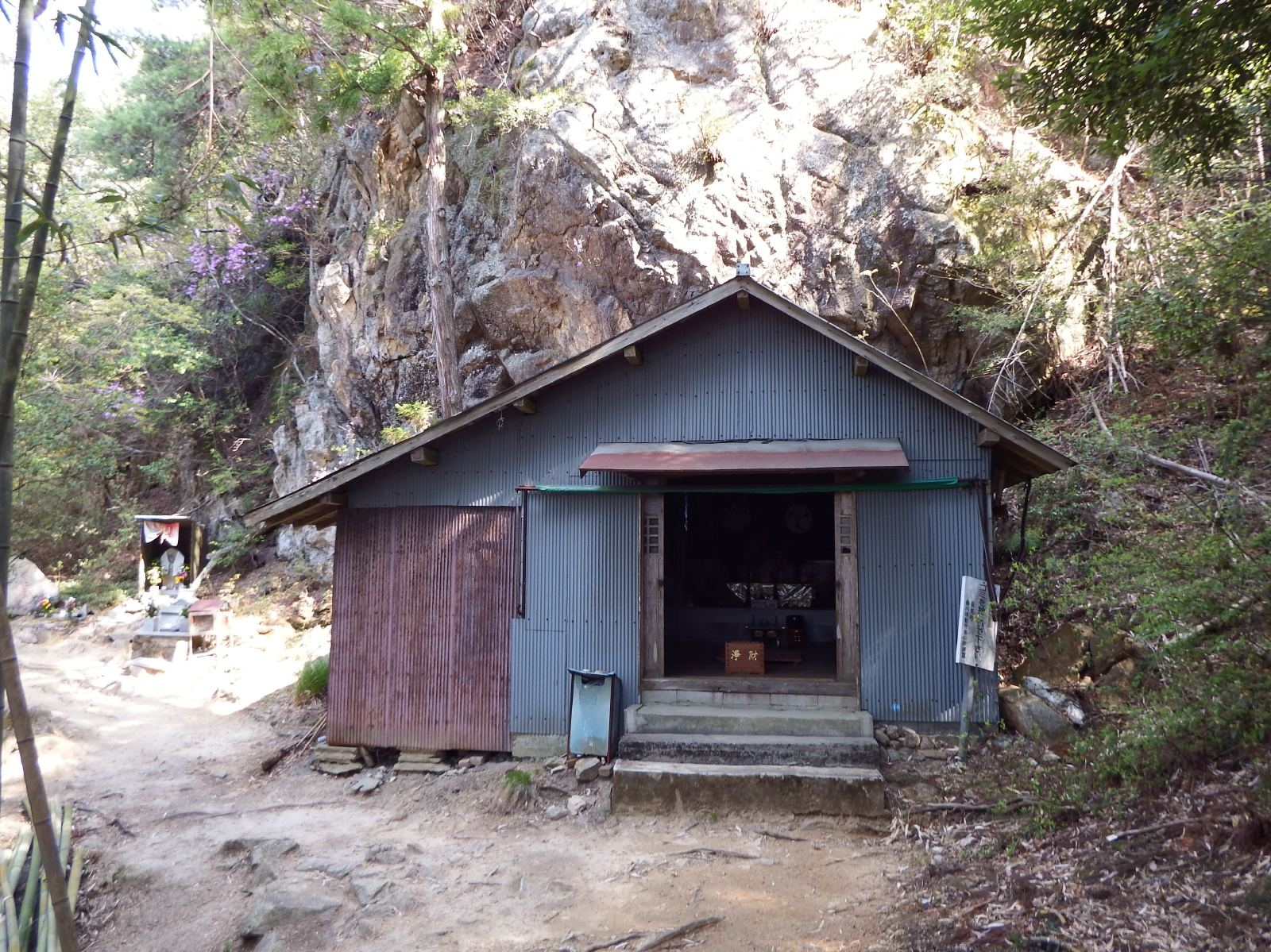 大窪寺の奥之院